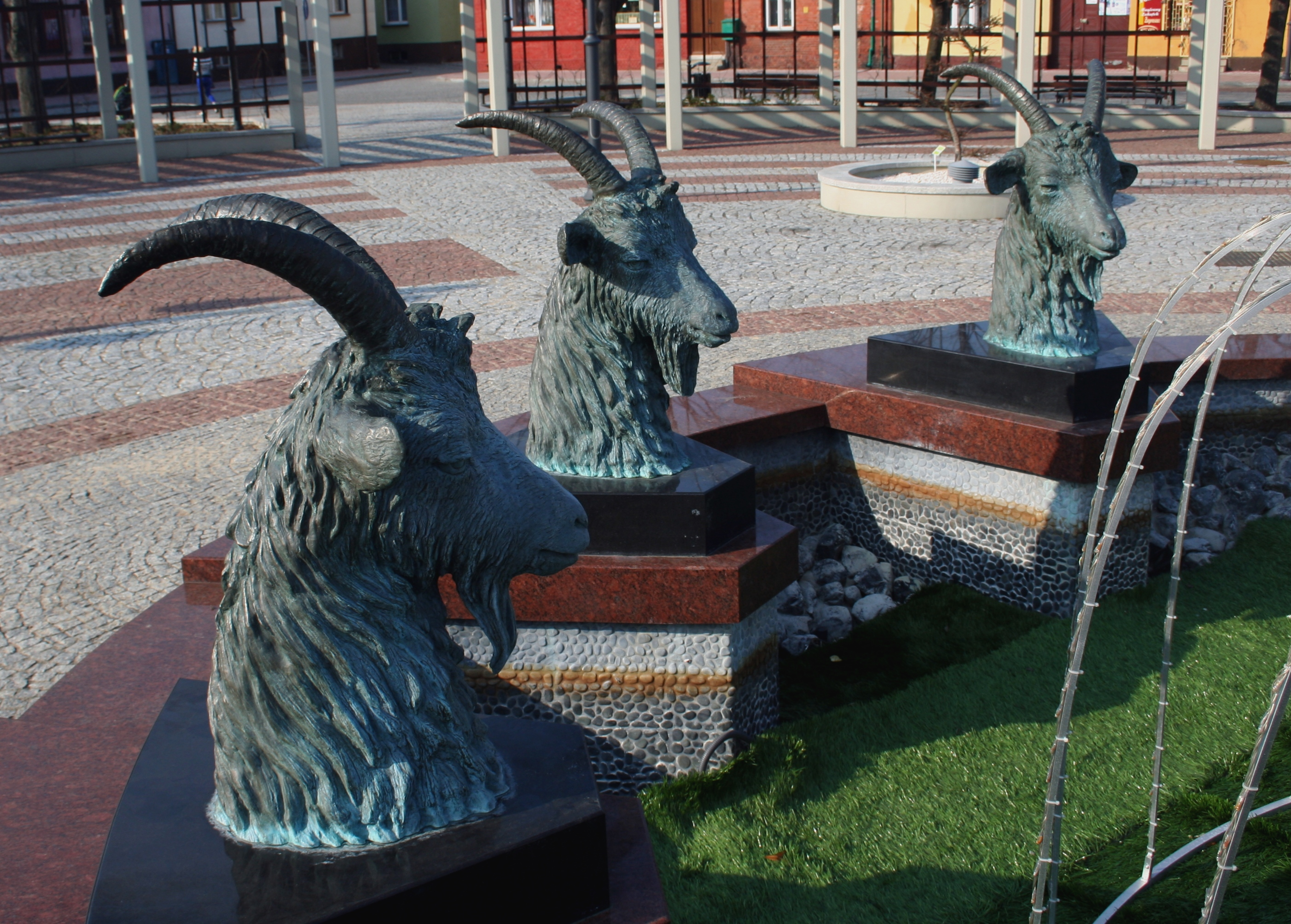 Rynek w Koziegłowach - symbol miasta